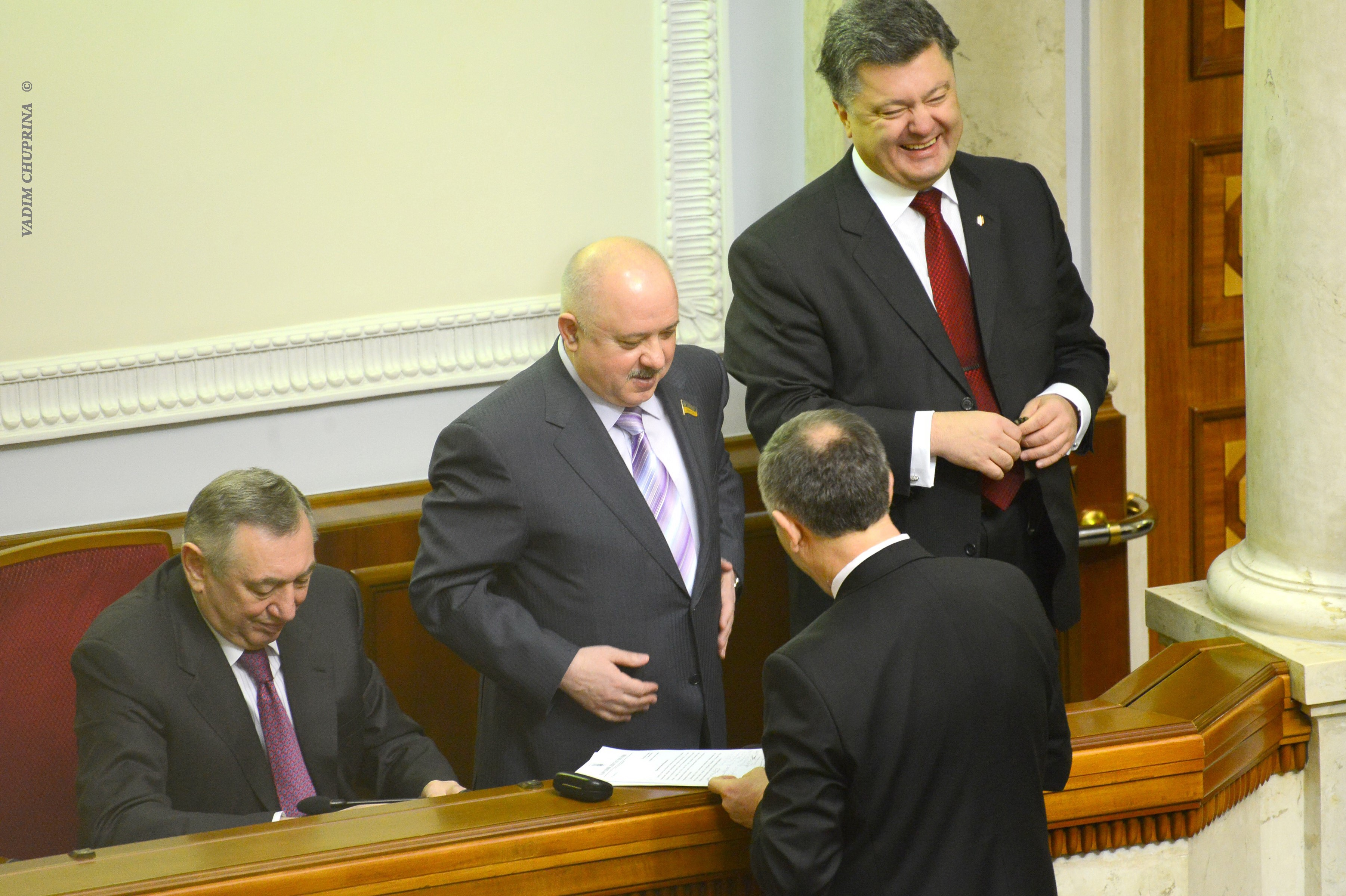 ВЕРХОВНА РАДА УКРАЇНИ 2013 , фото Вадим Чуприна